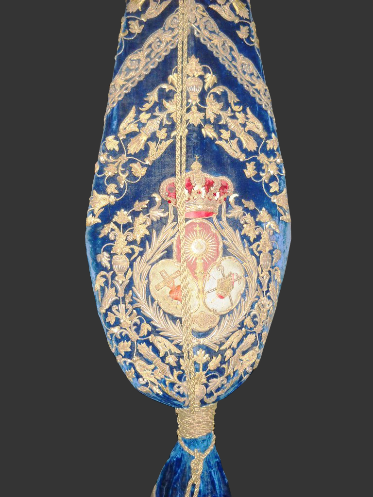 Escudo de la Hermandad de la Hiniesta. Semana Santa de Sevilla, España.